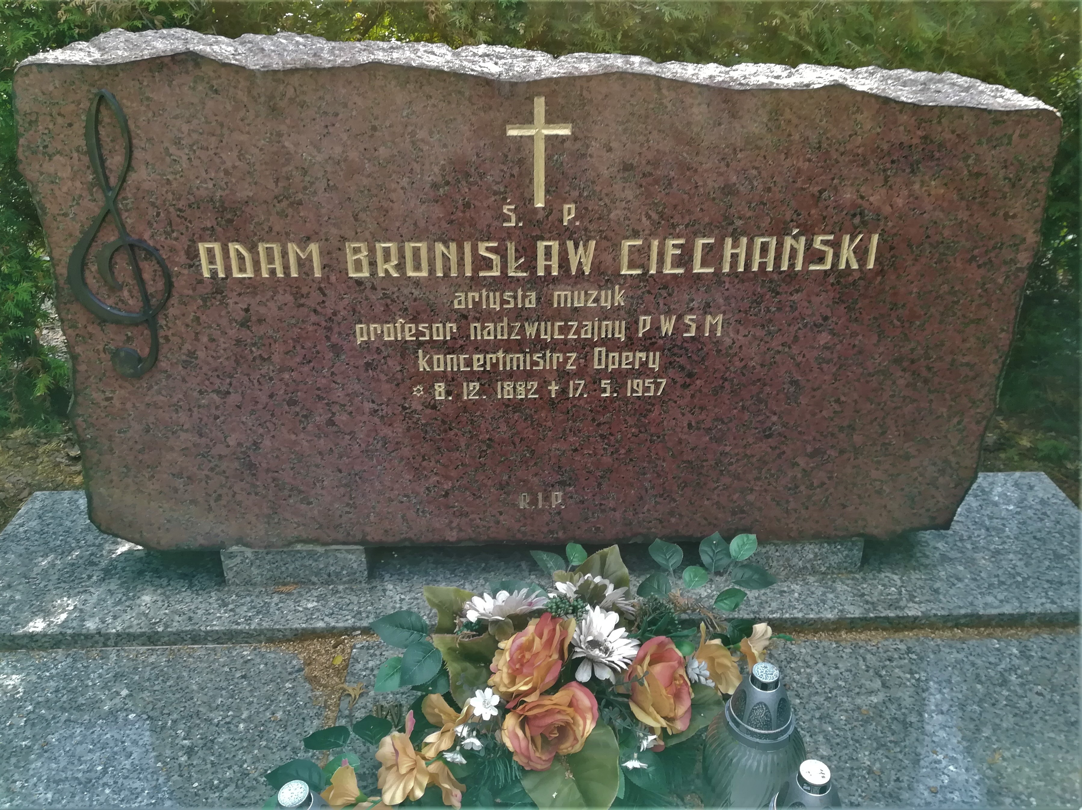 Grób kontrabasisty, prof. Adama Bronisława Ciechańskiego na cm. junikowo w Poznaniu.